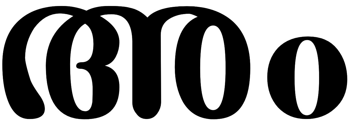 ഔ അക്ഷരം